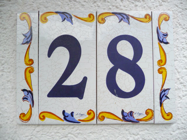 Hausnummer aus Keramik